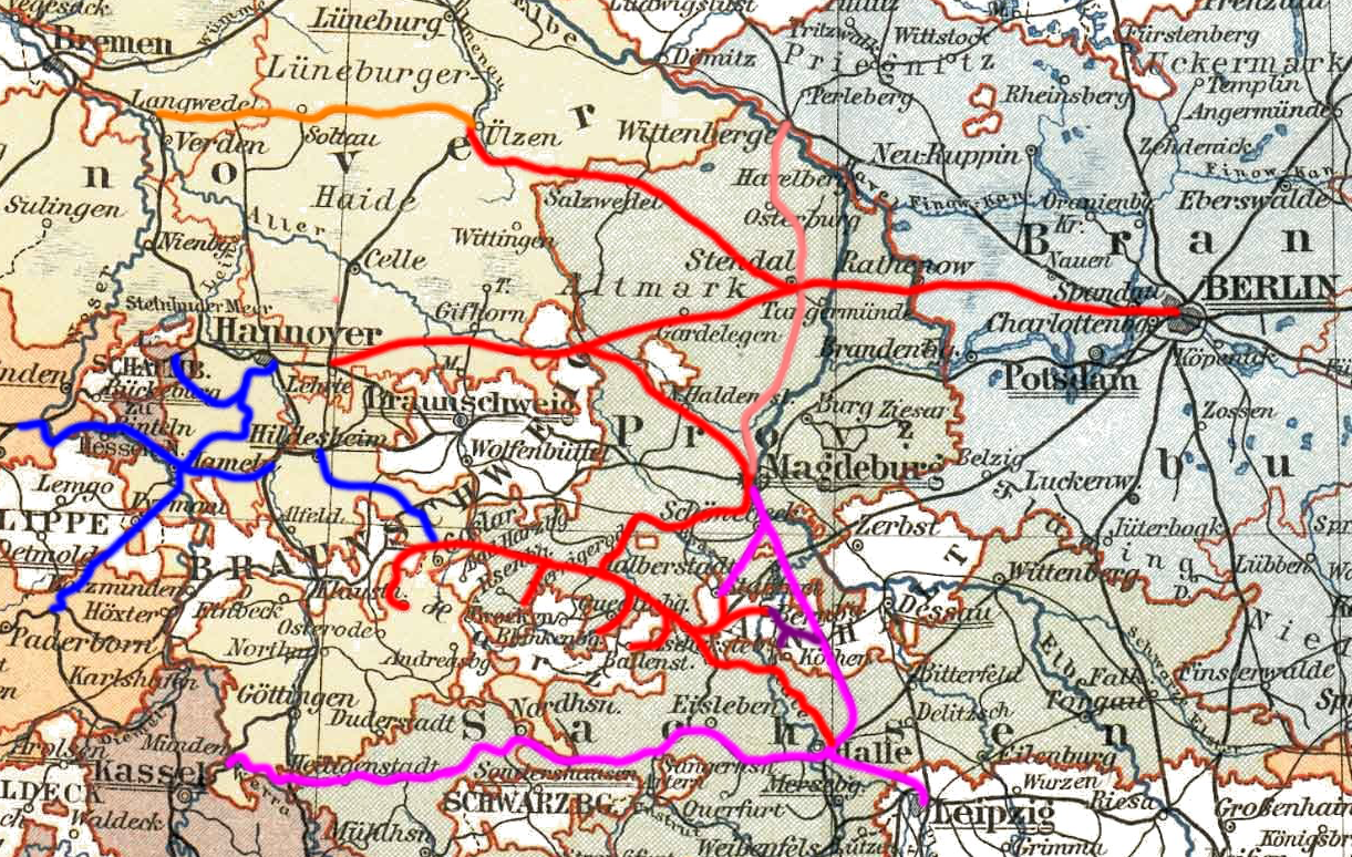 Streckennetz der Magdeburg-Halberstädter Eisenbahngesellschaft, basierend auf File:Prussia (political map before 1905).jpg